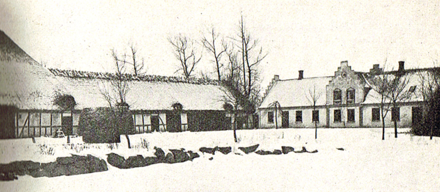 Blangstedgaard er en gammel hovedgård, som nævnes første gang i 1309, da tilhørte den Odensebisperne. Gården ligger i Odense Kommune, Odense Herred.